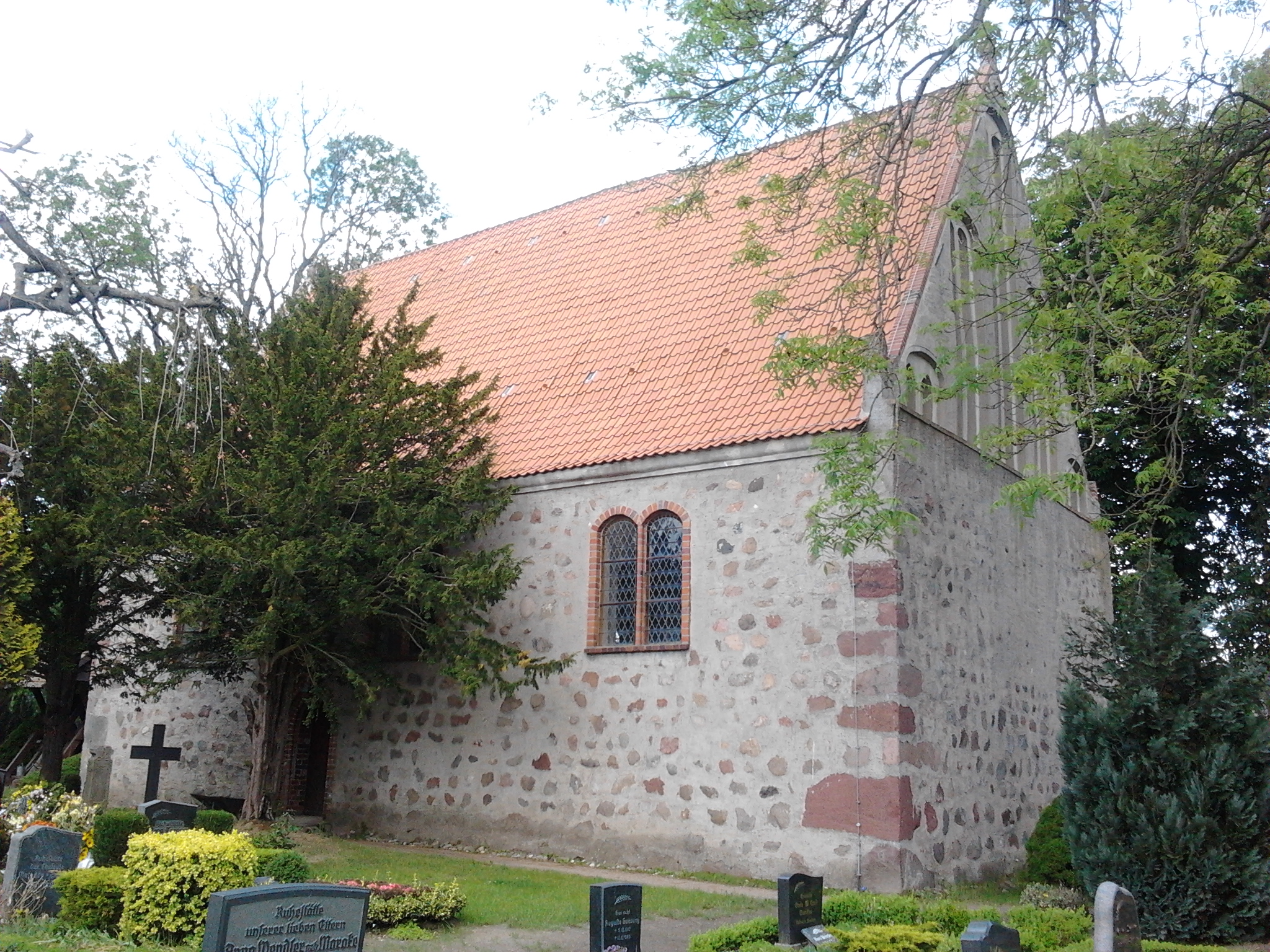 Kirche in Groß Bünzow, Landkreis Ostvorpommern, Südseite